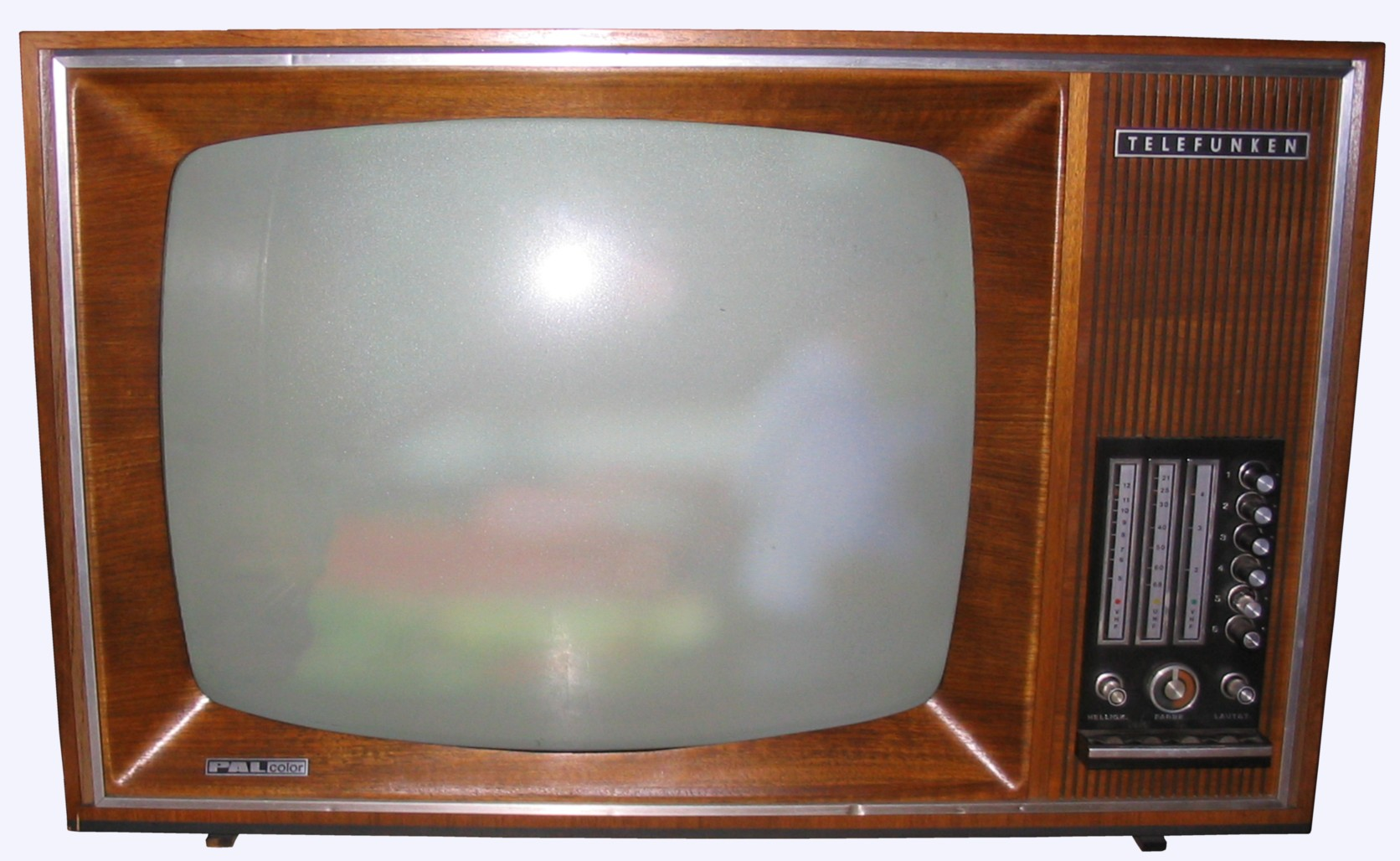 Telefunken PALcolor 708T - erster PAL-Farbfernseher von Telefunken von 1967